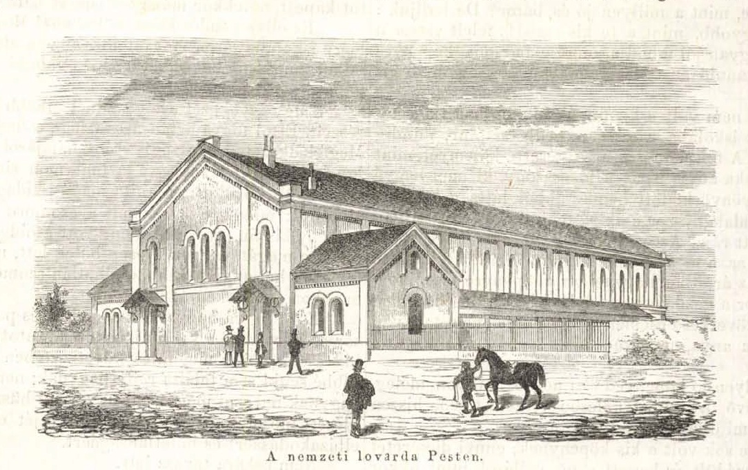 Vasárnapi Újság A Nemzeti lovarda épülete